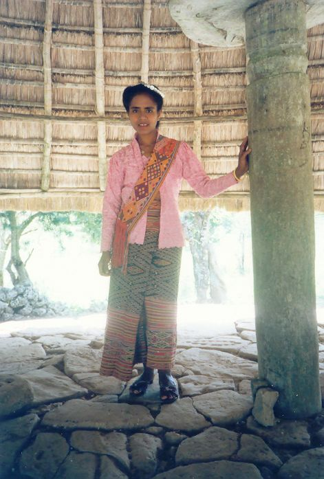 Festliche Frauenkleidung, Tetaf, Westamanuban